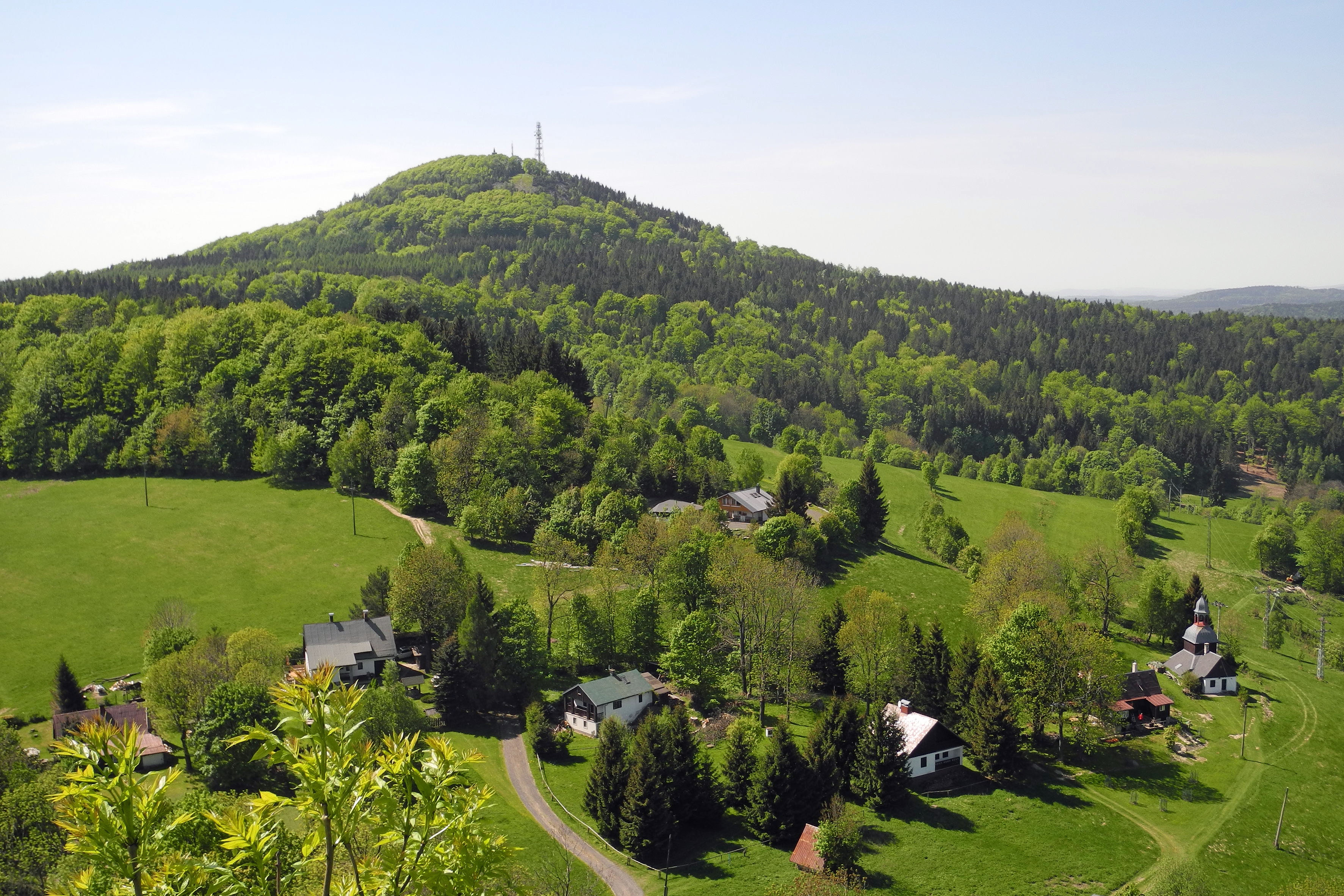 Blick von der Burgruine Tollenstein (Tolštejn) bei Sankt Georgenthal im Lausitzer Bergland auf Innozenzendorf (Lesné) und den Tannenberg (Jedlová)